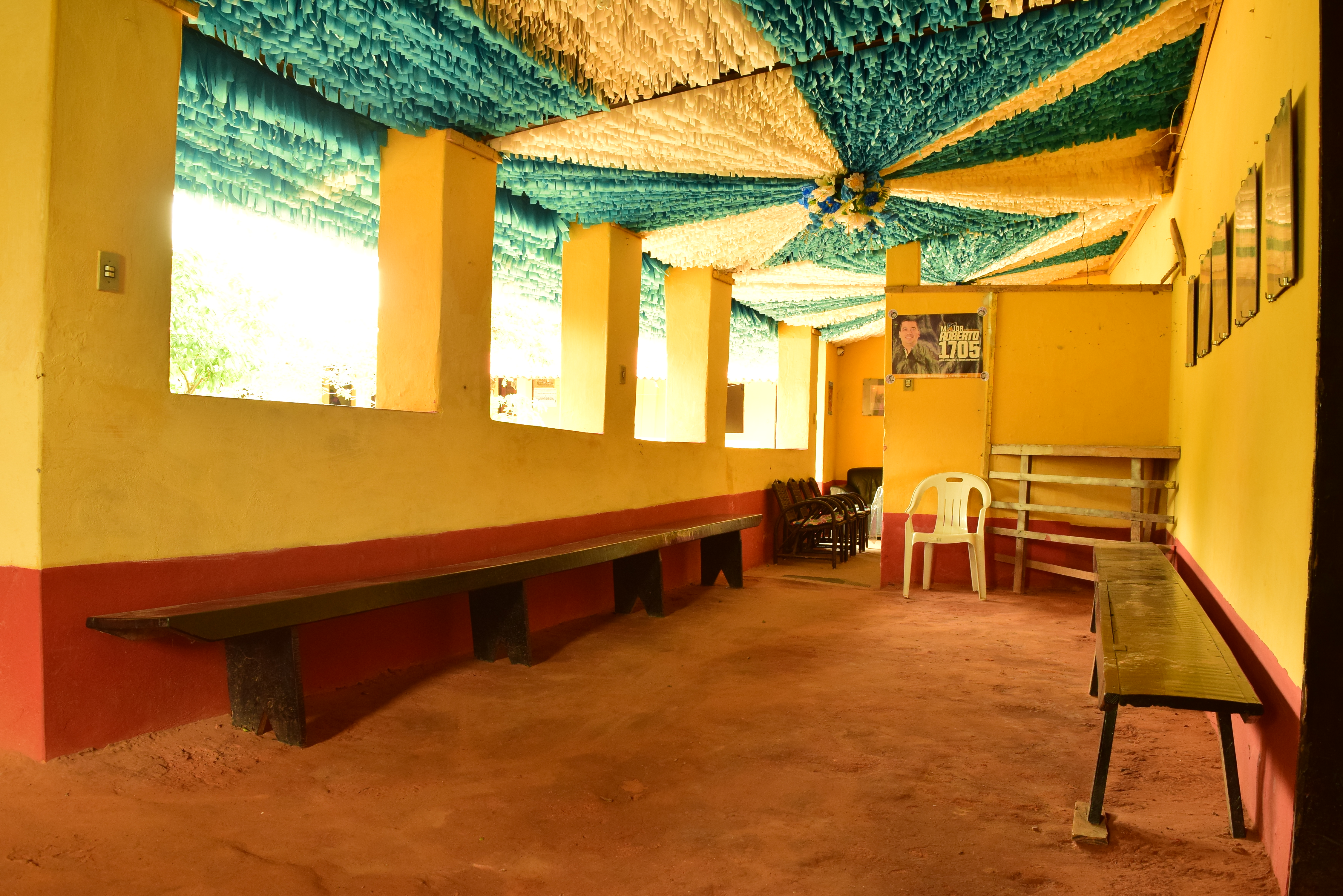 Terreiro Casa das Minas Jeje, situado na Rua de São Pantaleão nº 857 e 857A.